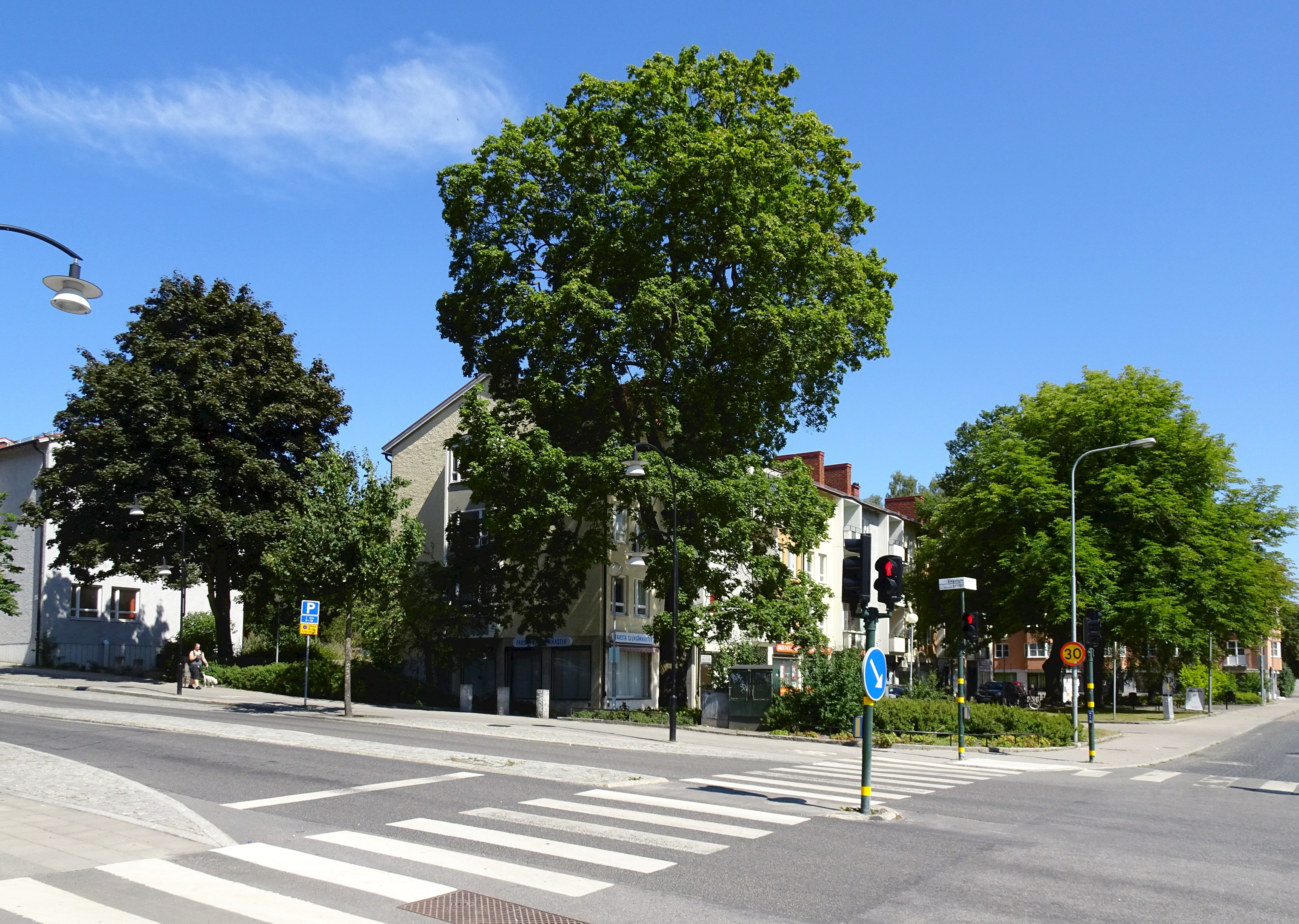 Hörnet Lingvägen - Gubbängsvägen med ett kvarvarande träd (stor lönn) från Herrängens gårds trådgård